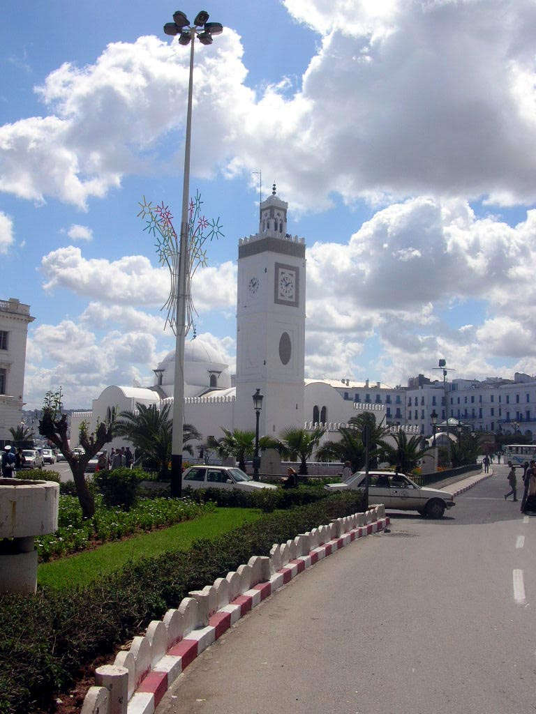 Le titre prête à confusion: il ne s'agit pas de la Grande mosquée, mais de la "nouvelle" mosquée d'Alger (mosquée Jamaa al-Jdid), appelée aussi la mosquée de la pêcherie